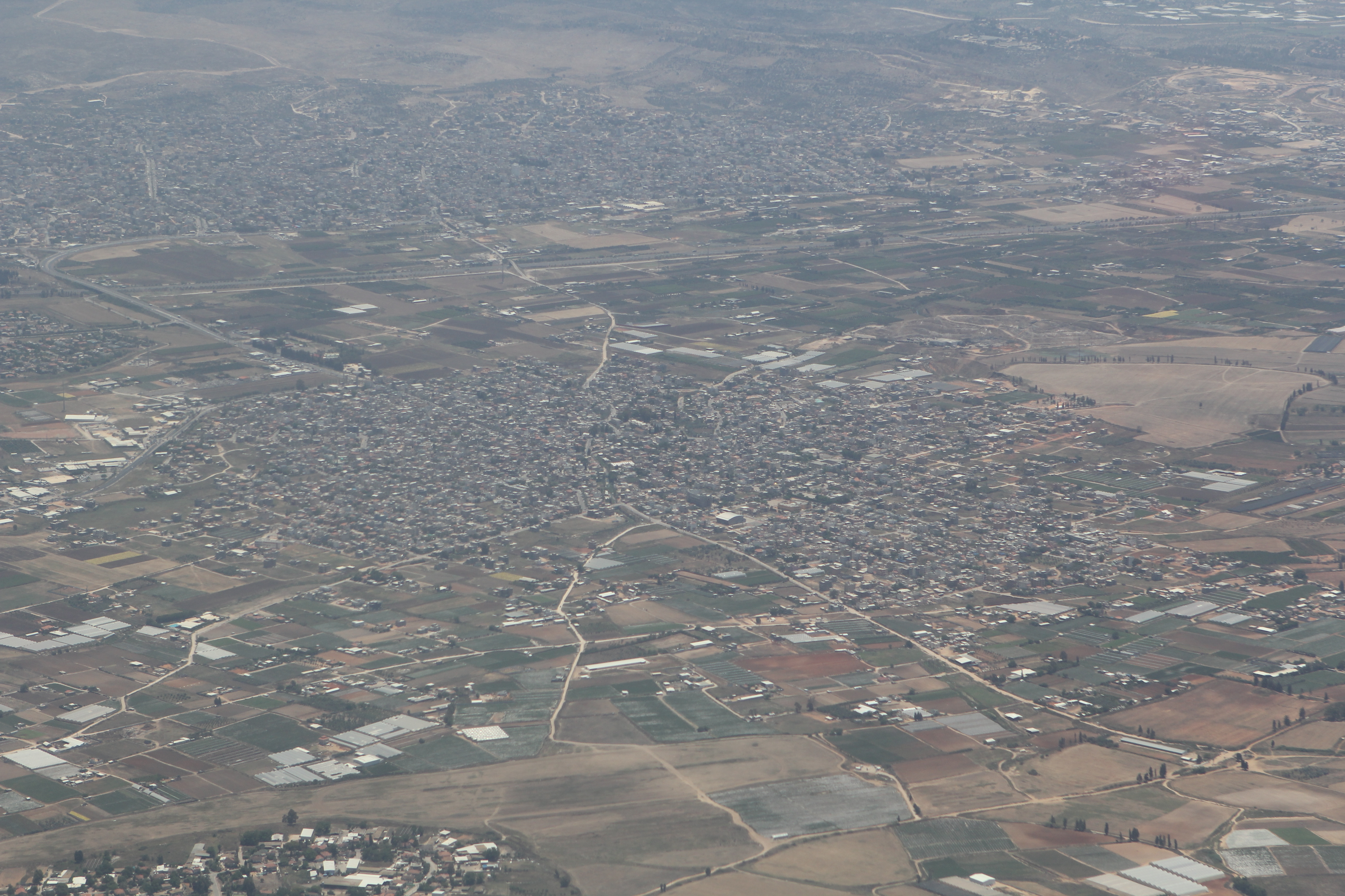 צילום אוויר של קלנסווה